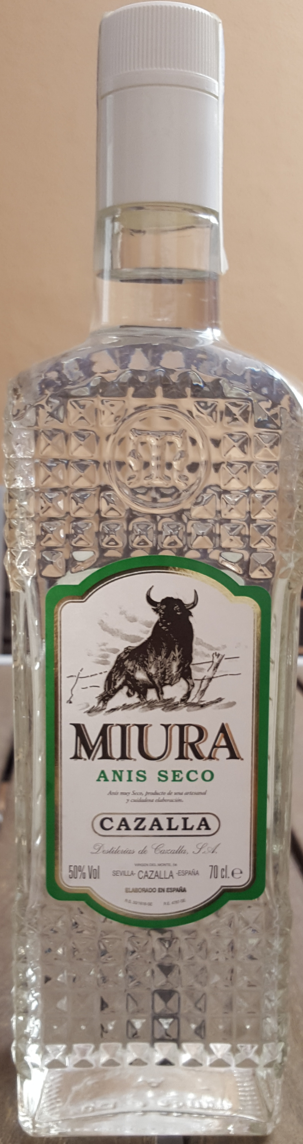 Anís típico de Cazalla, Sevilla, España